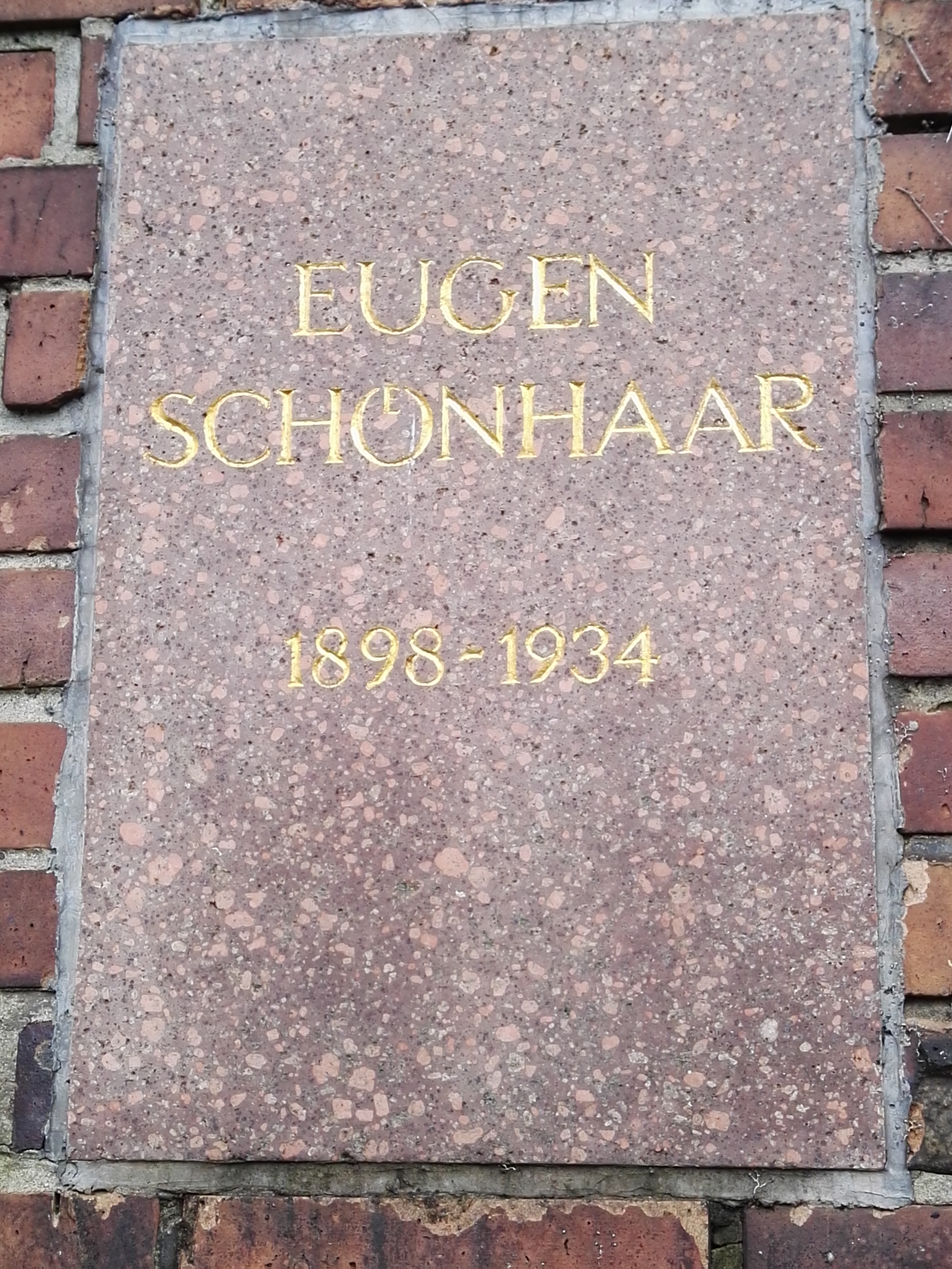 Grab von Eugen Schönhaar im Rondell in der Gedenkstätte der Sozialisten auf dem Zentralfriedhof Friedrichsfelde in Berlin-Lichtenberg